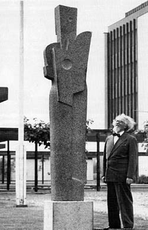 Skulptören Christian Berg med sin "Monumentalfigur"